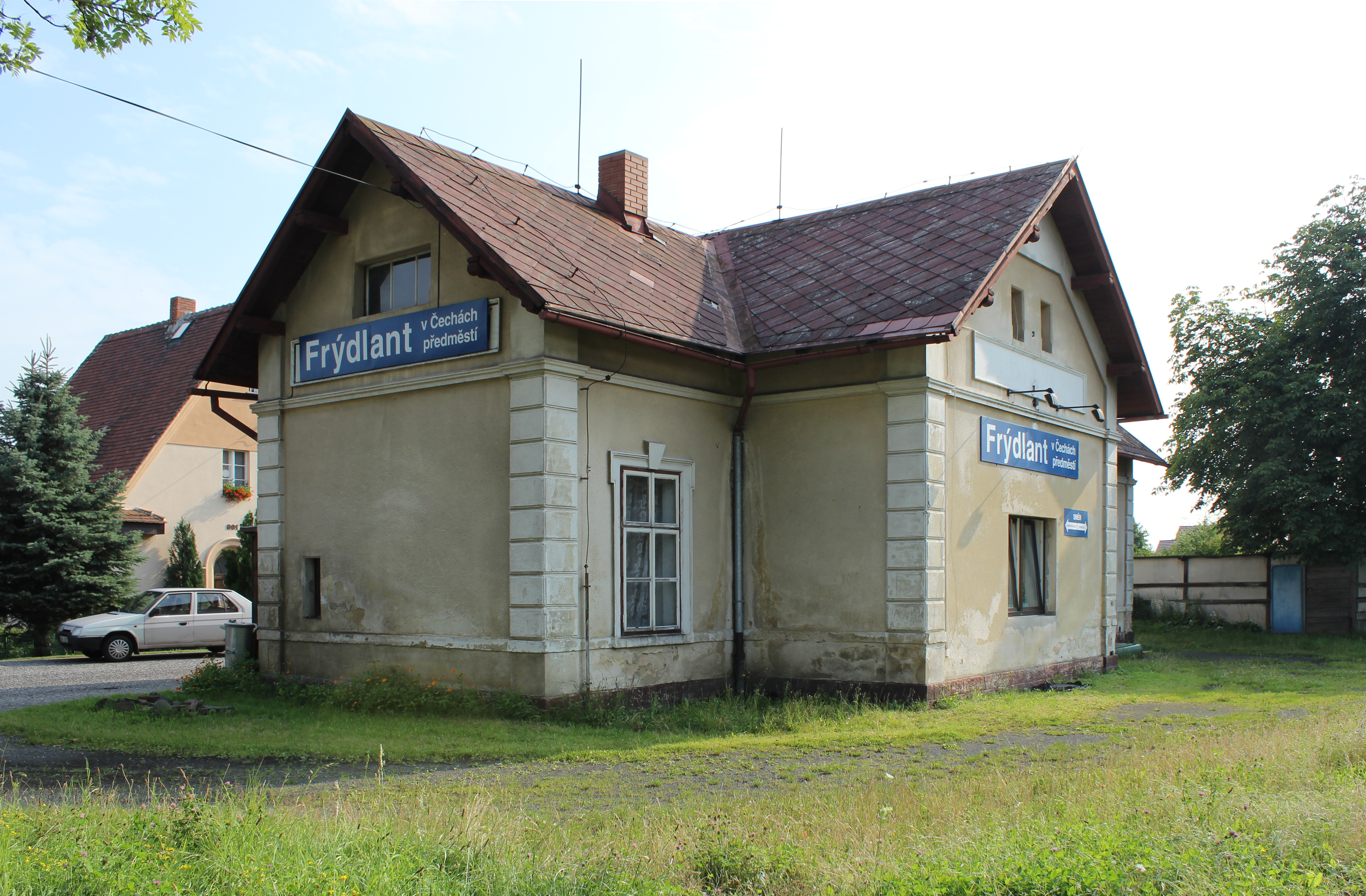 Železniční nákladiště a zastávka na trati číslo 039 spojující Frýdlant s Jindřichovicemi pod Smrkem.